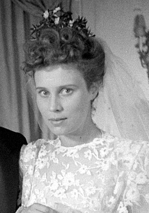 Antje Weisgerber in Sternheims Snob